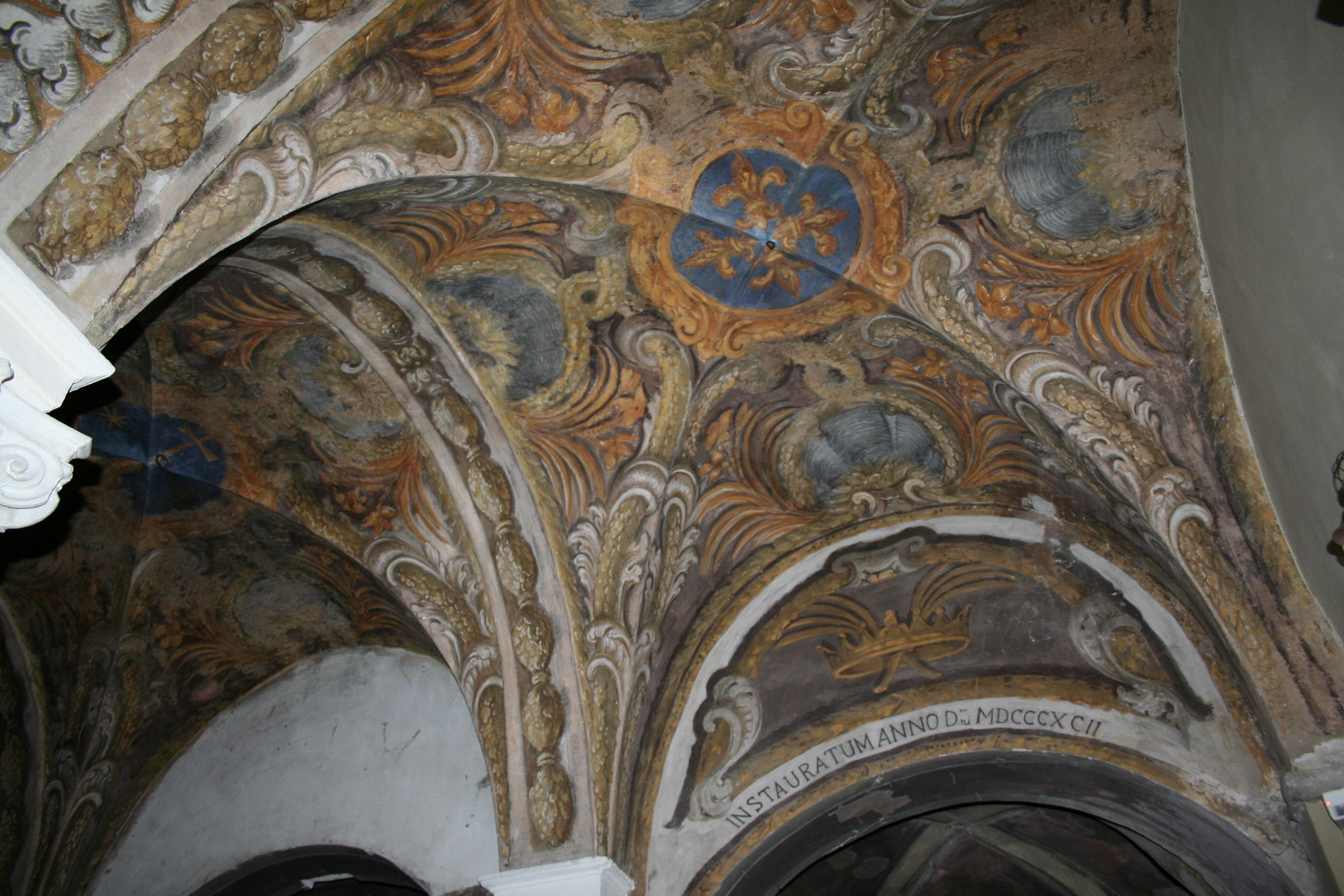 Cripta di Sant’Emidio di Ascoli Piceno, interno, volta dipinta, proprio scatto Sibilla.io "Utilizzo concesso" Ticket#2007040410014627 (ticket per le immagini) This file is licensed under Creative Commons 3.0 license